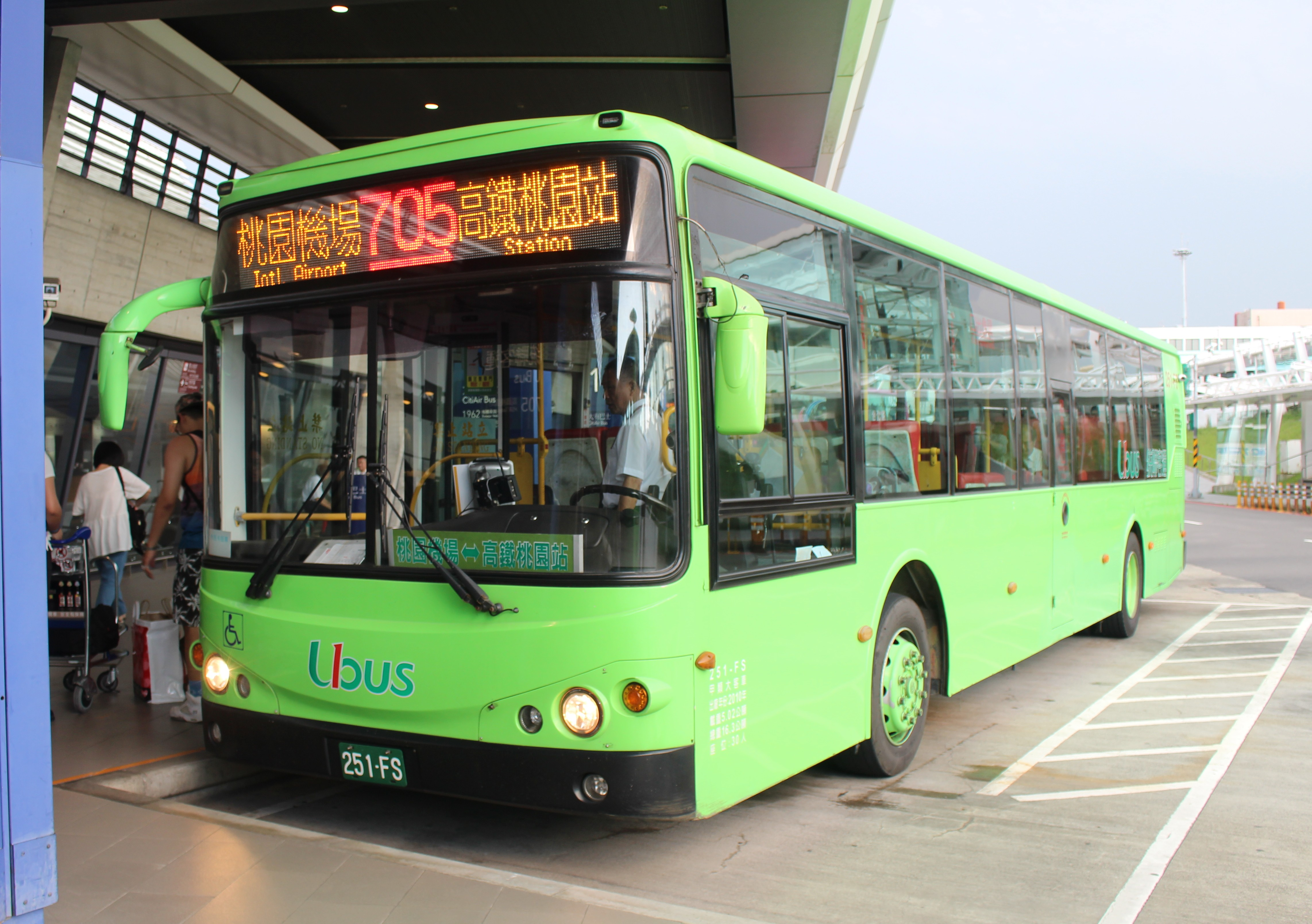 統聯客運2009_KINGLONG_KL6120U1_251-FS_705